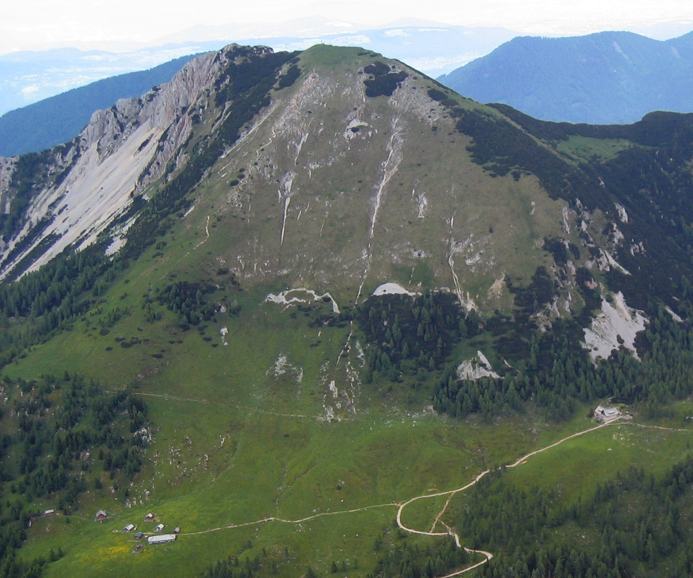 Kosiak (Geißberg, 2024m) from SW